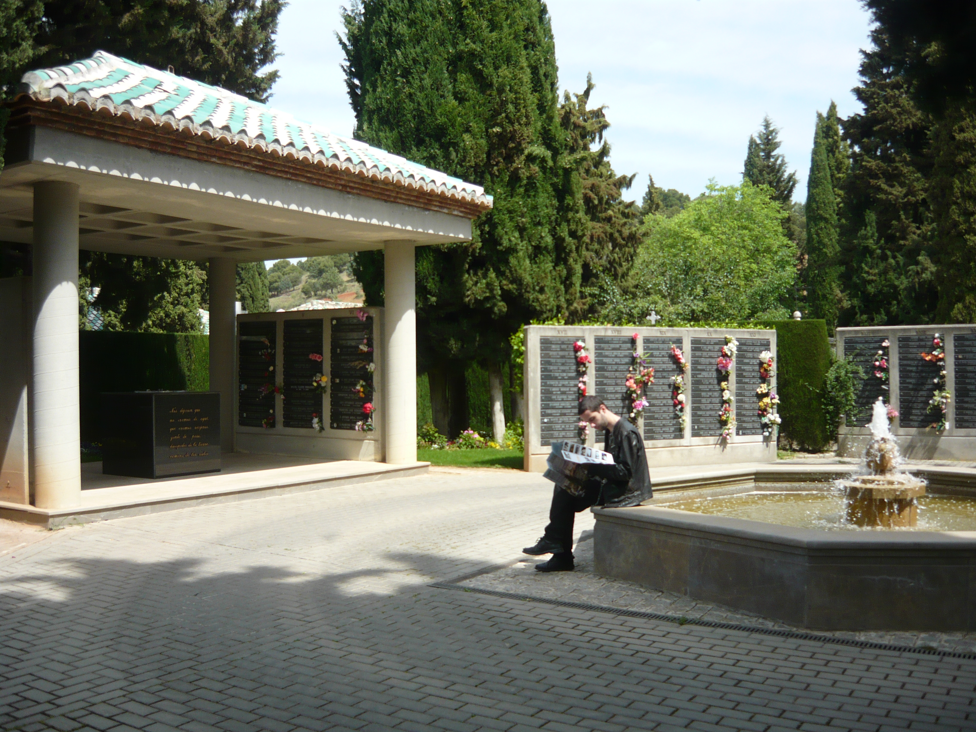 Plaza del patio segundo del Cementerio de San José (Granada).